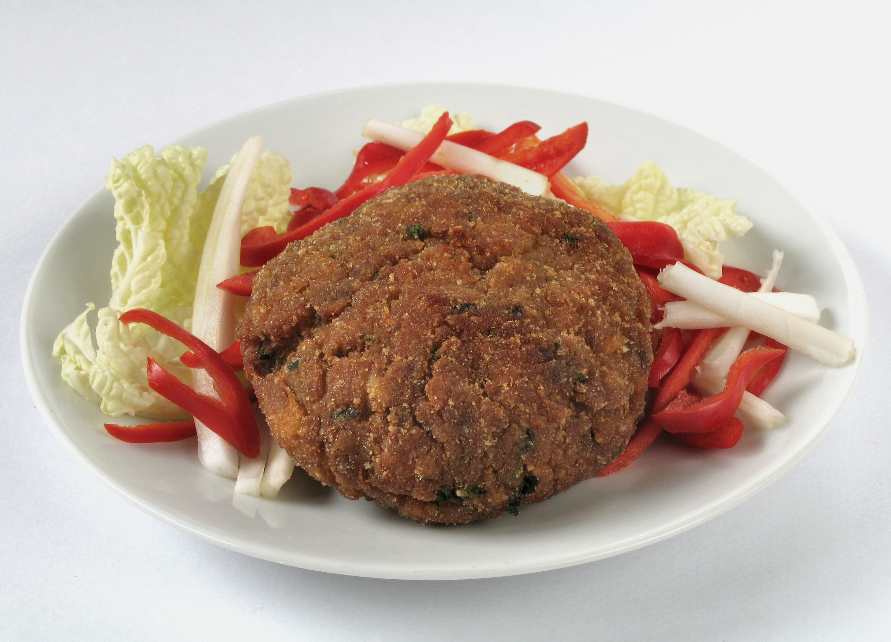 Faschiertes Laibchen, österreichisches Gericht (Speise)